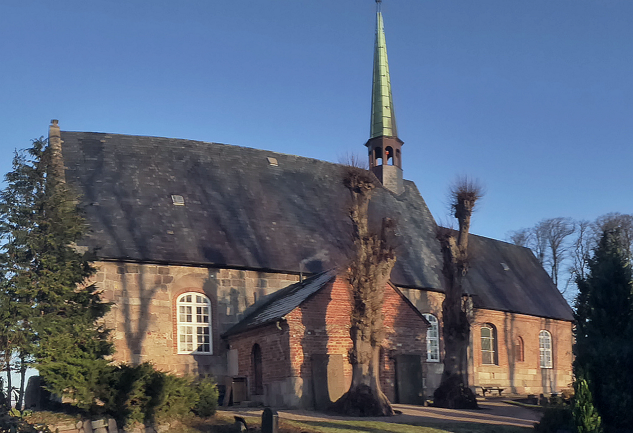 Norderbrarup romanische St-Marien-Kirche Natursteinquader Mauerwerk etwa aus 13. Jahrhundert Südostseite Foto 2018 Wolfgang Pehlemann P1280431